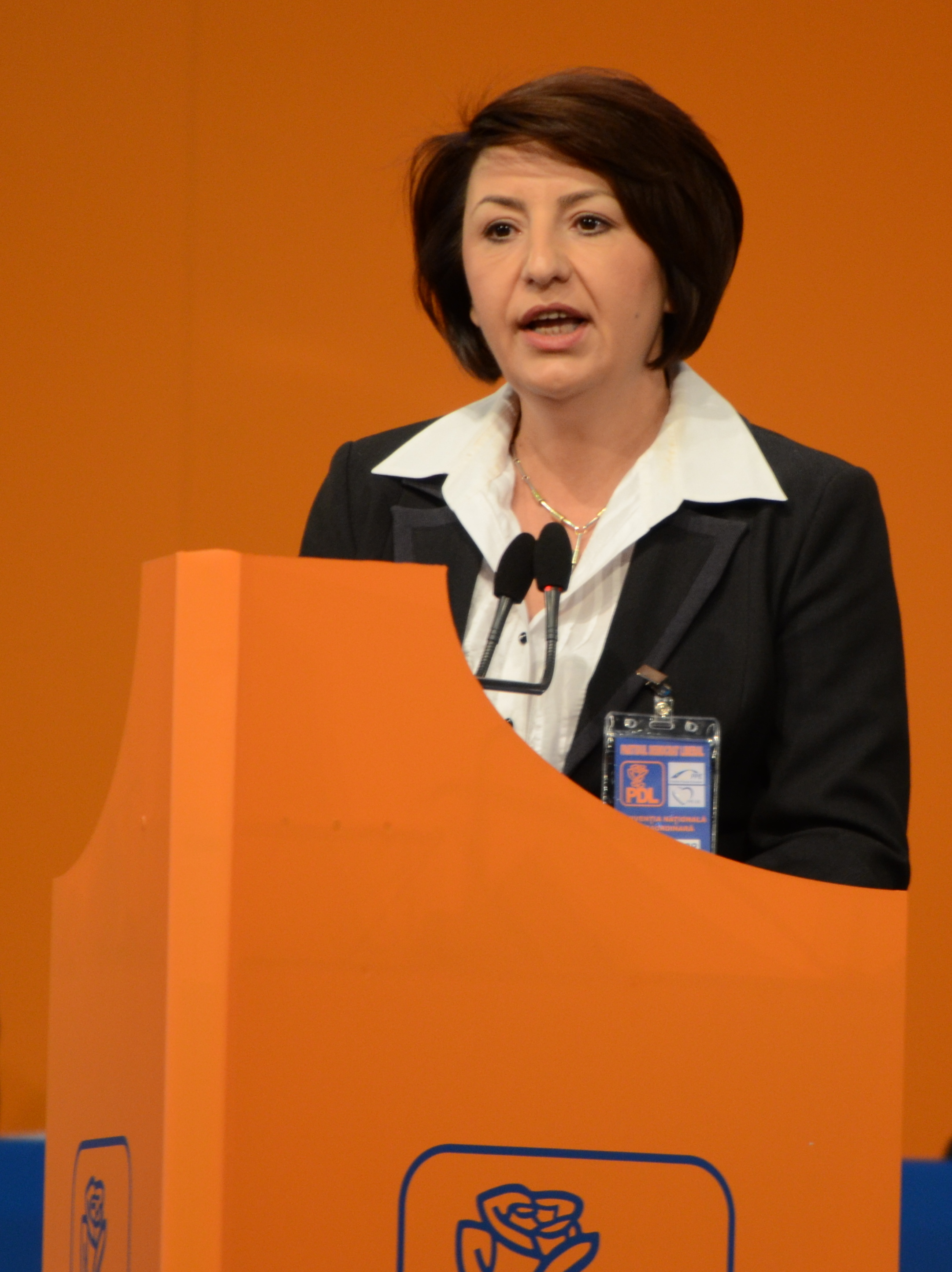 Sulfina Barbu (la Convenția națională extraordinară a Partidului Democrat-Liberal, 23 martie 2013)